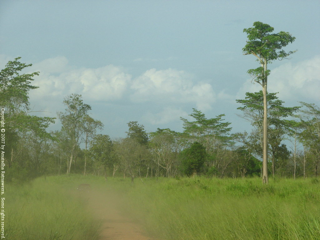 Maduru Oya National Park in Sri Lanka